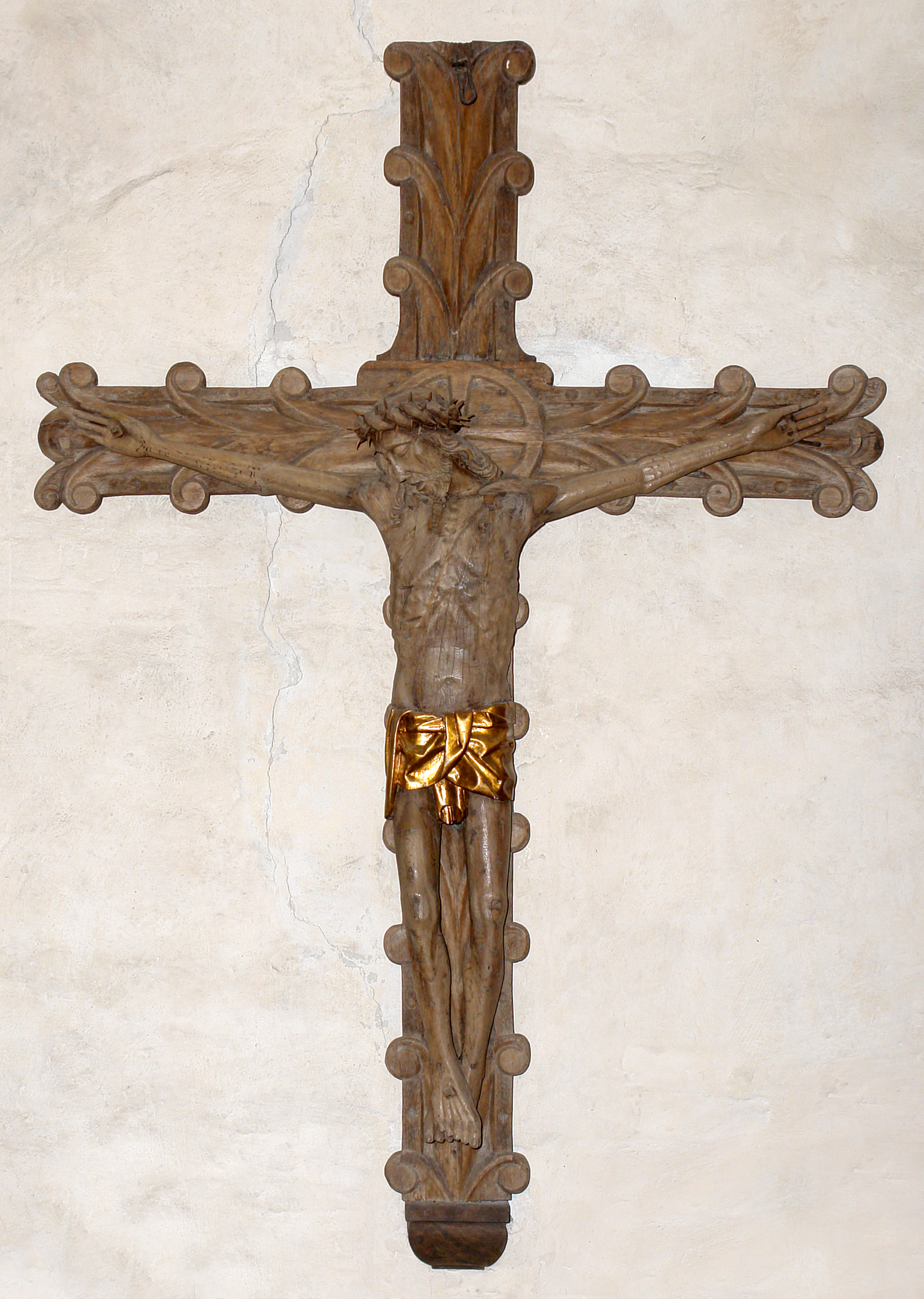 Kirche von Undløse, Dänemark (West-Seeland). Triumphkreuz aus der ersten Hälfte des 14. Jahrhunderts mit einer Christus-Figur aus der Zeit um 1450 (160 cm hoch)